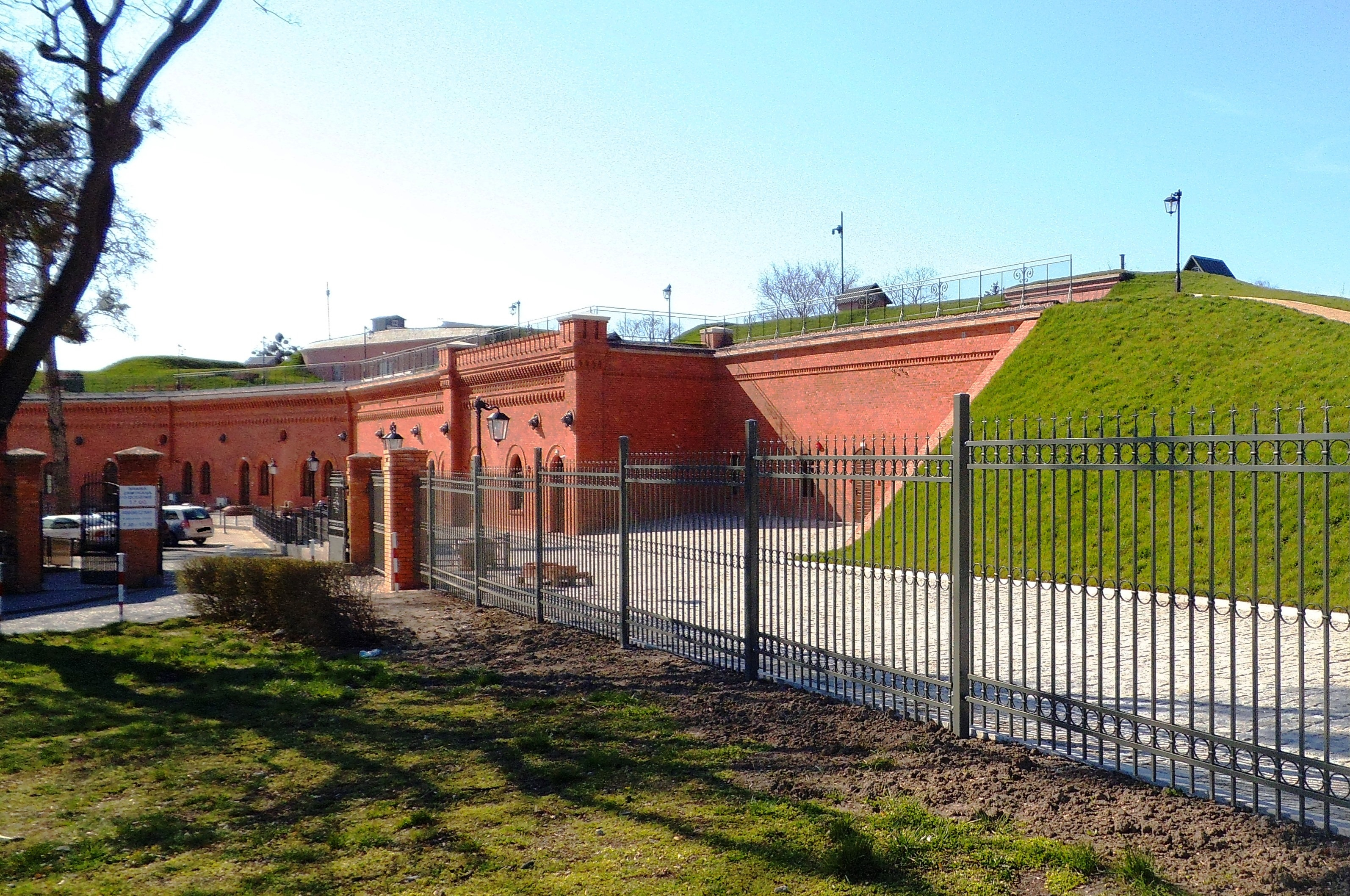 Muzeum Twierdzy Toruń